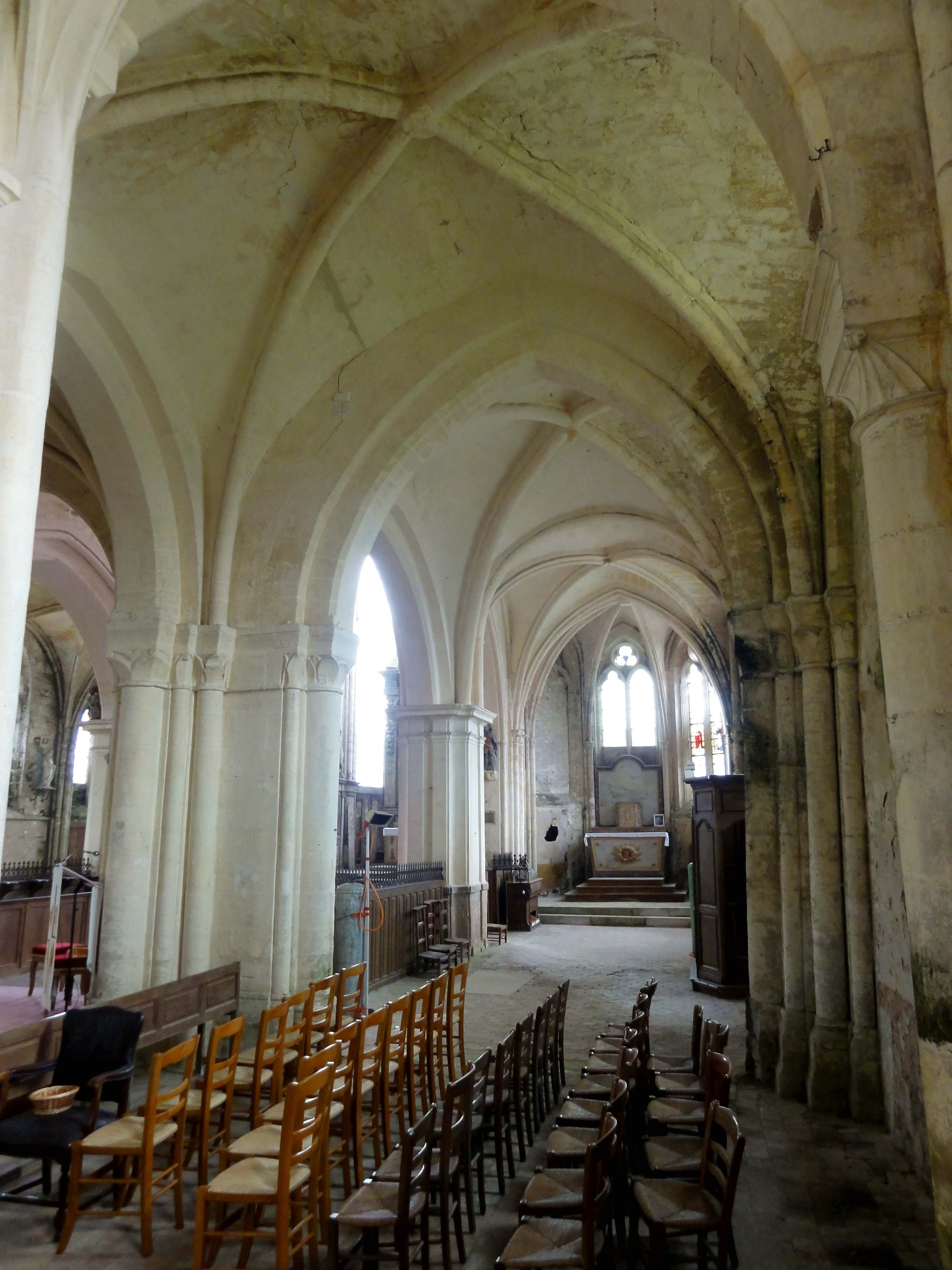 Intérieur de l'église (voir titre).